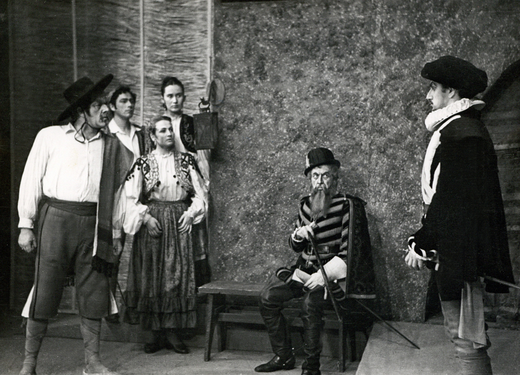 Pedro Calderon de la Barca, Sodnik Zalamejski, SNG v Mariboru. Na fotografiji: Arnold Tovornik (Pedro Crespo), Boris Brunčko (Juan), Mira Sardoč (Izabela), Angelca Jenčič Jankova (Ines), Jože Mlakar (Filip II.), Roman Lavrač (Don Mendo).